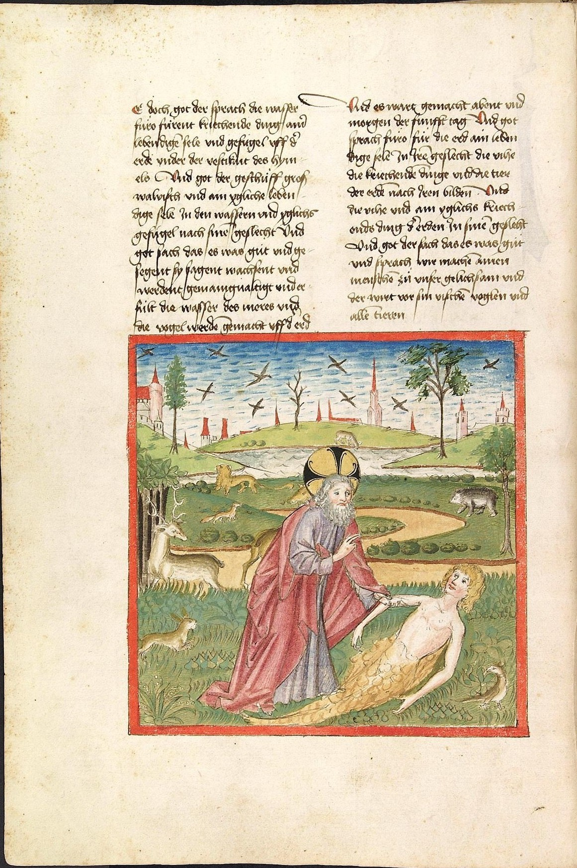 Codex Palatinus germanicus 16, Blatt 10v - Bibel, Altes Testament, Genesis: Gott erschafft Adam aus einem Lehmklumpen. (Cpg 16 = Bibel AT, deutsch, Bücher Mose, Josua, Richter, Ruth)